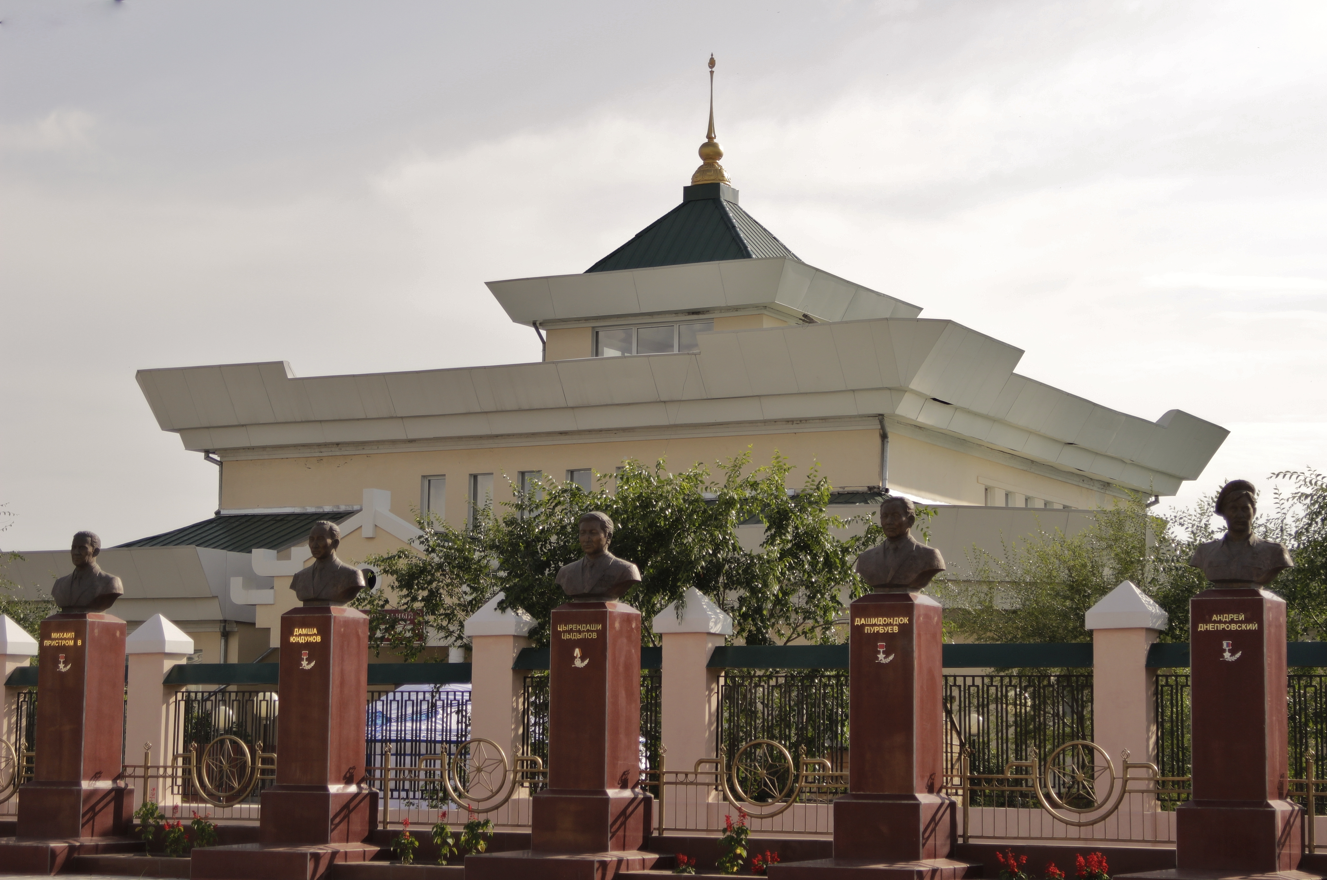 Агинский краеведческий музей имени Гомбожапа Цыбикова